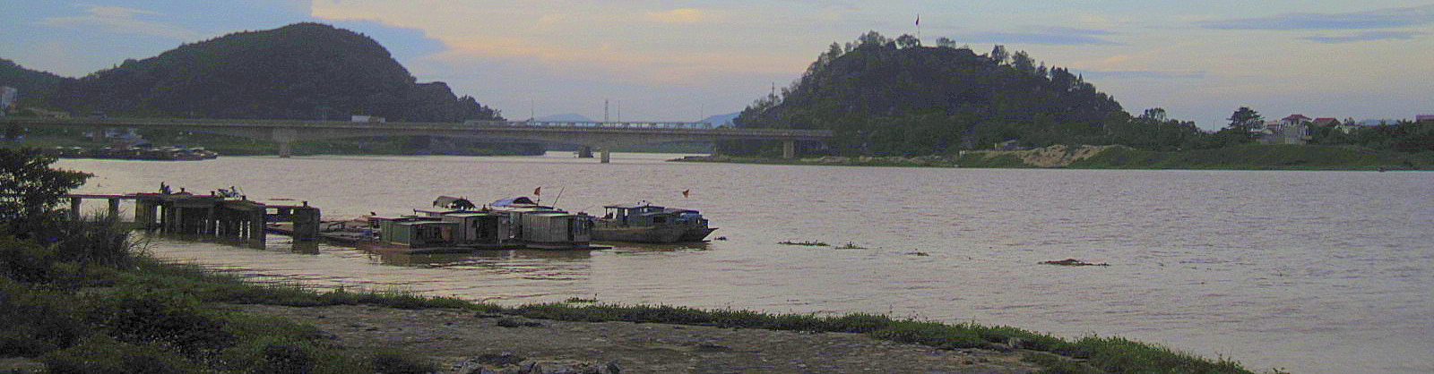 Đoạn đê sông Mã, nơi xảy ra vụ ném bom kinh hoàng ngày 14/6/1972 làm gần 400 dân công Thanh Hóa hy sinh.